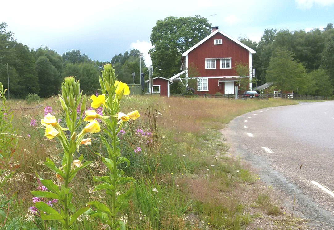 Gamla Stationshuset i Hult vid Försjövägen.